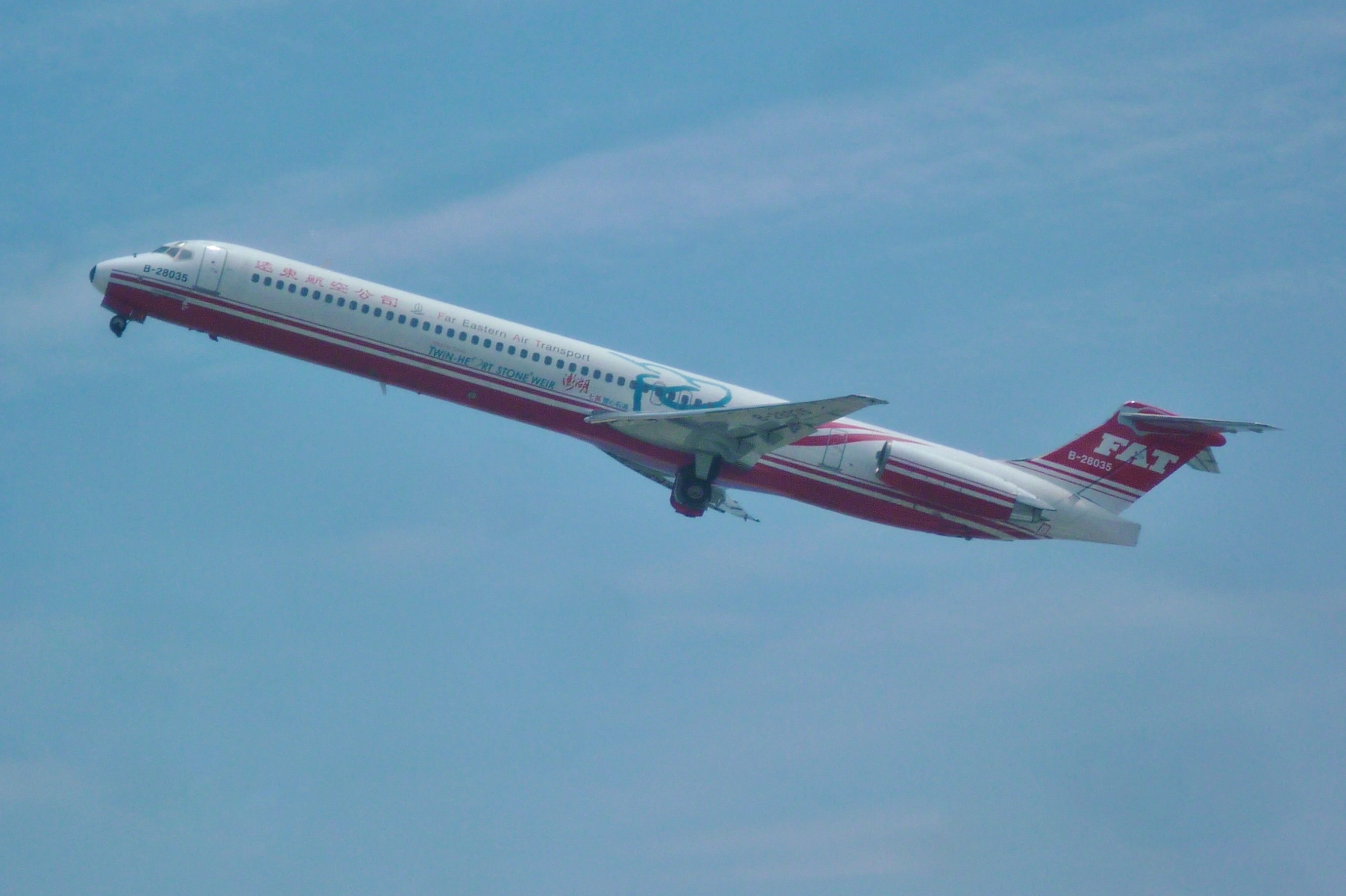 遠航MD-82澎湖雙心石滬彩繪機，正從金門機場起飛中，攝於2016年8月13日。